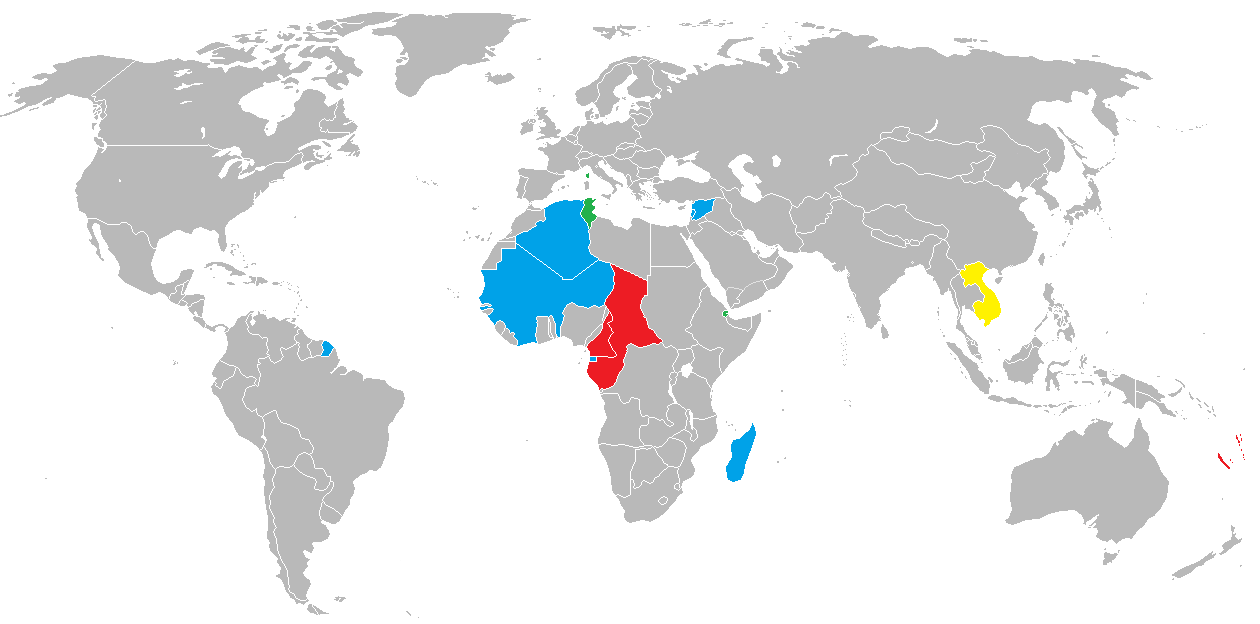 Kolonie pod kontrolou Svobodné Francie v roce 1940 Kolonie pod kontrolou Svobodné Francie v roce 1942 Kolonie pod kontrolou Svobodné Francie v roce 1943 Francouzská Indočína okupovaná Japonskem